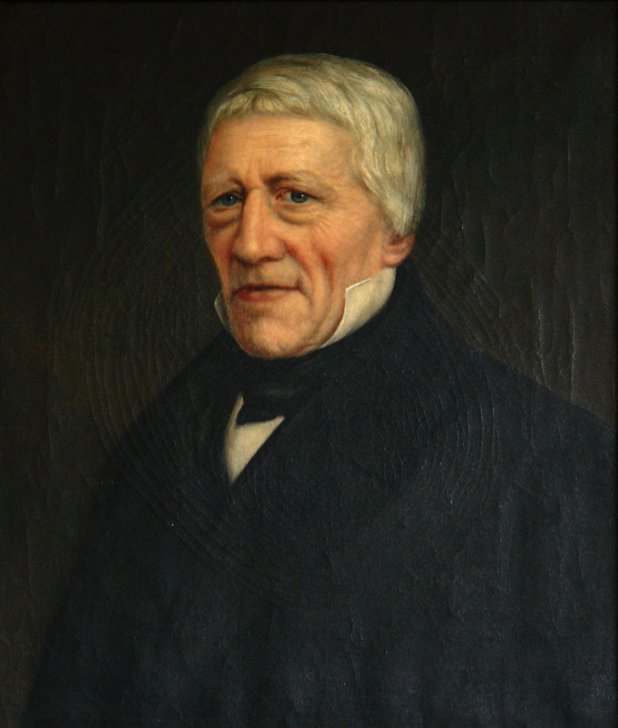 Focke-Museum Bremen: Bürgermeister Johann Smidt (1773-1857). Gemälde um 1848, vielleicht von Addig Jaburg